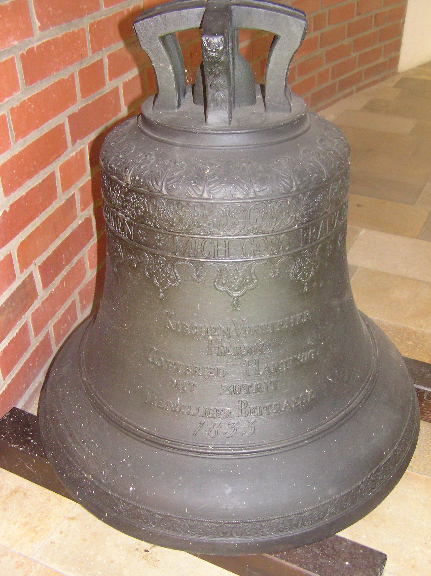 Glocke im Vorraum der Kath. Kirche St. Paulus in Quakenbrück, Hengelage